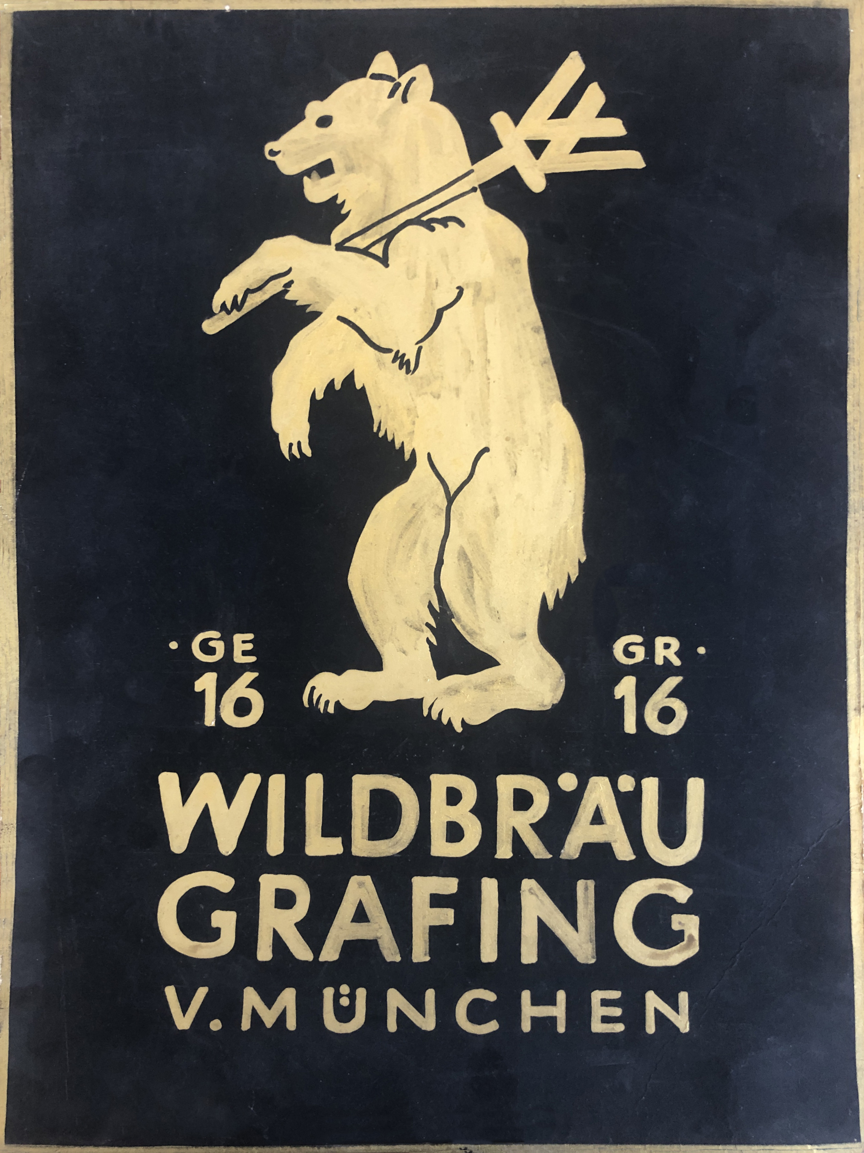 Das historische Firmenzeichen vom Wildbräu.